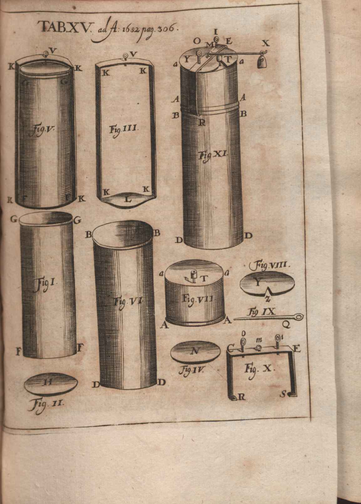 Illustration